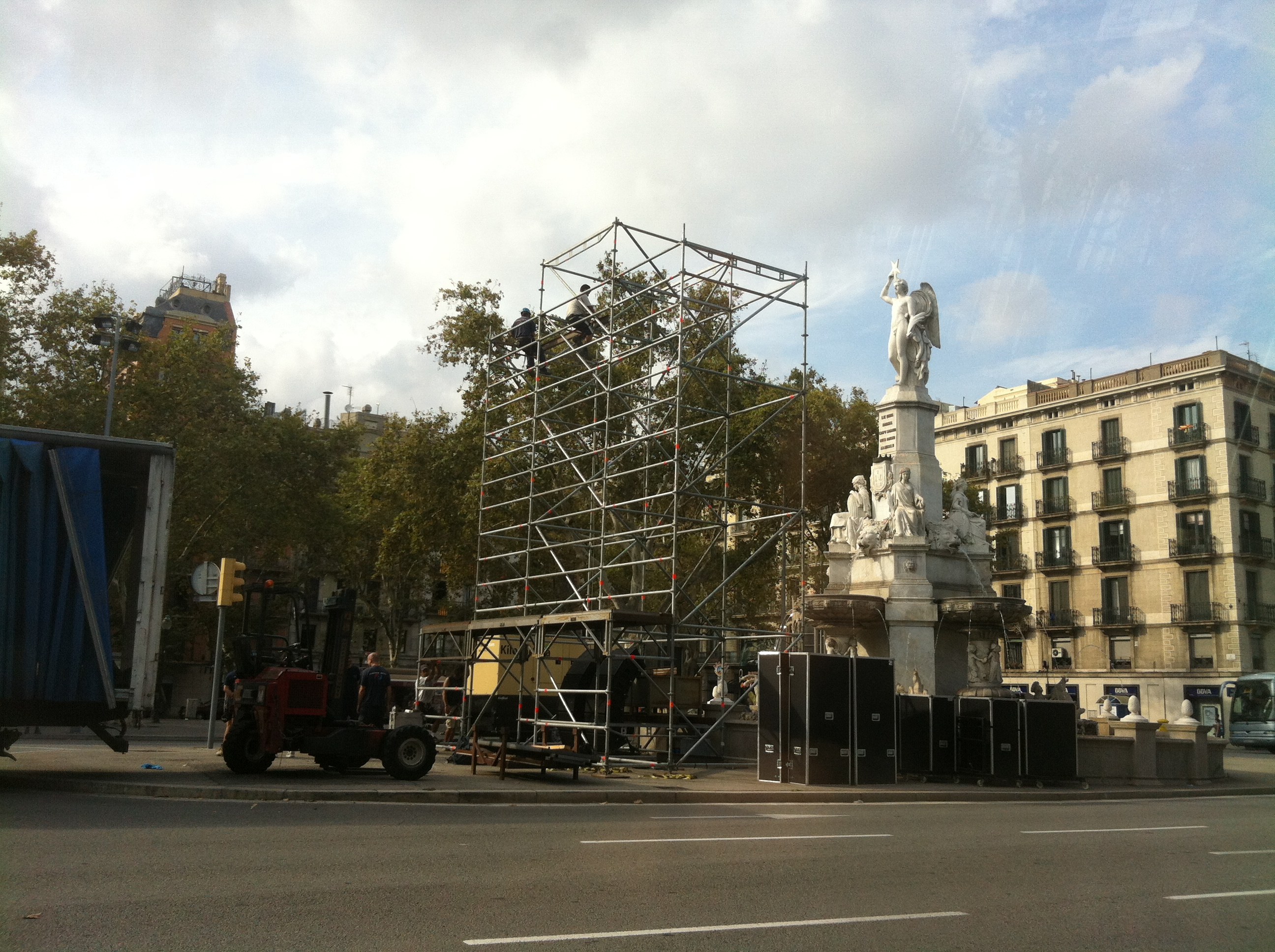 Media is preparing their Towers the Day before Catalan march of independece 2012